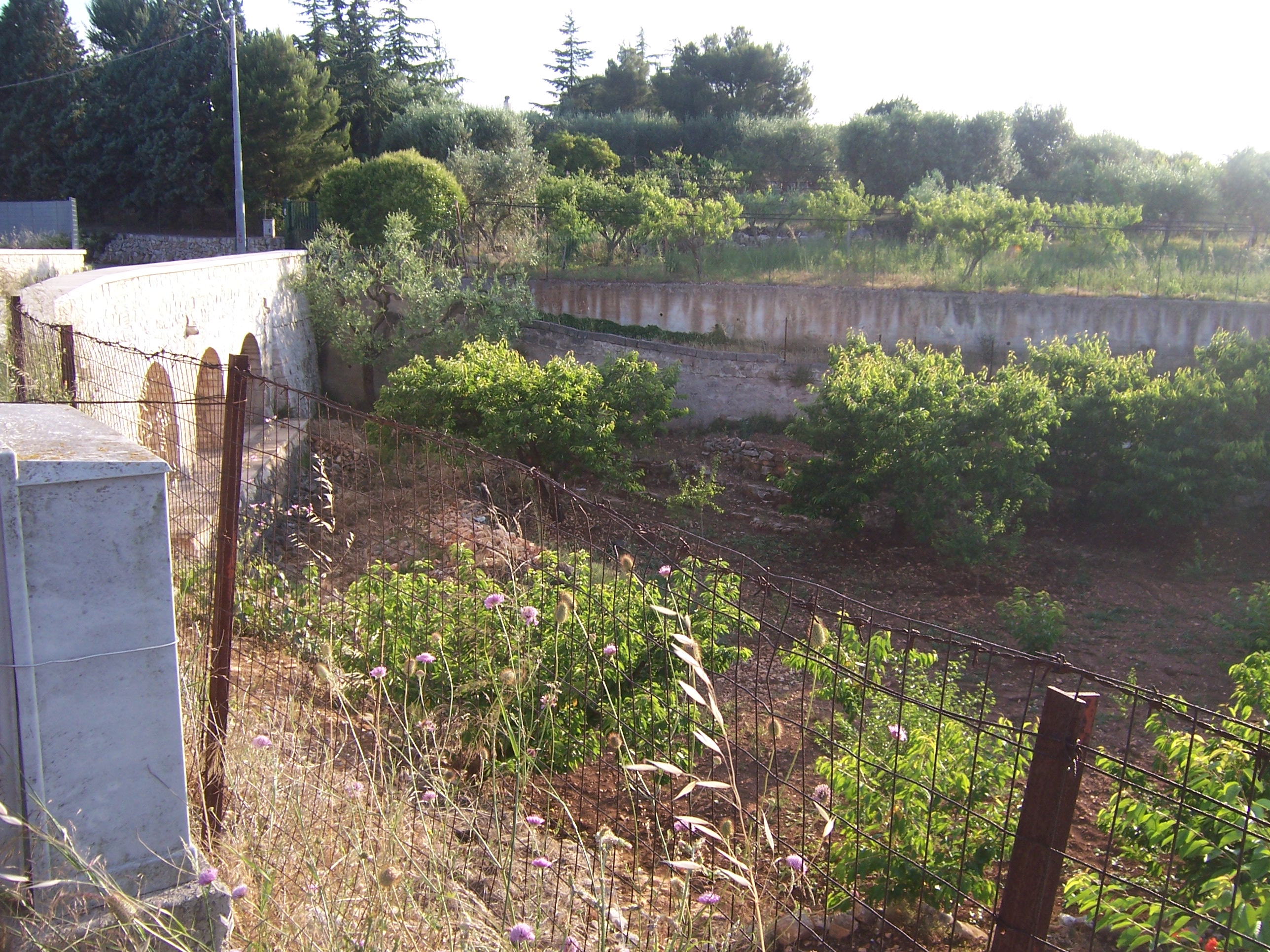 Lama Giotta vista dall'altra parte del ponte a Turi (BA)